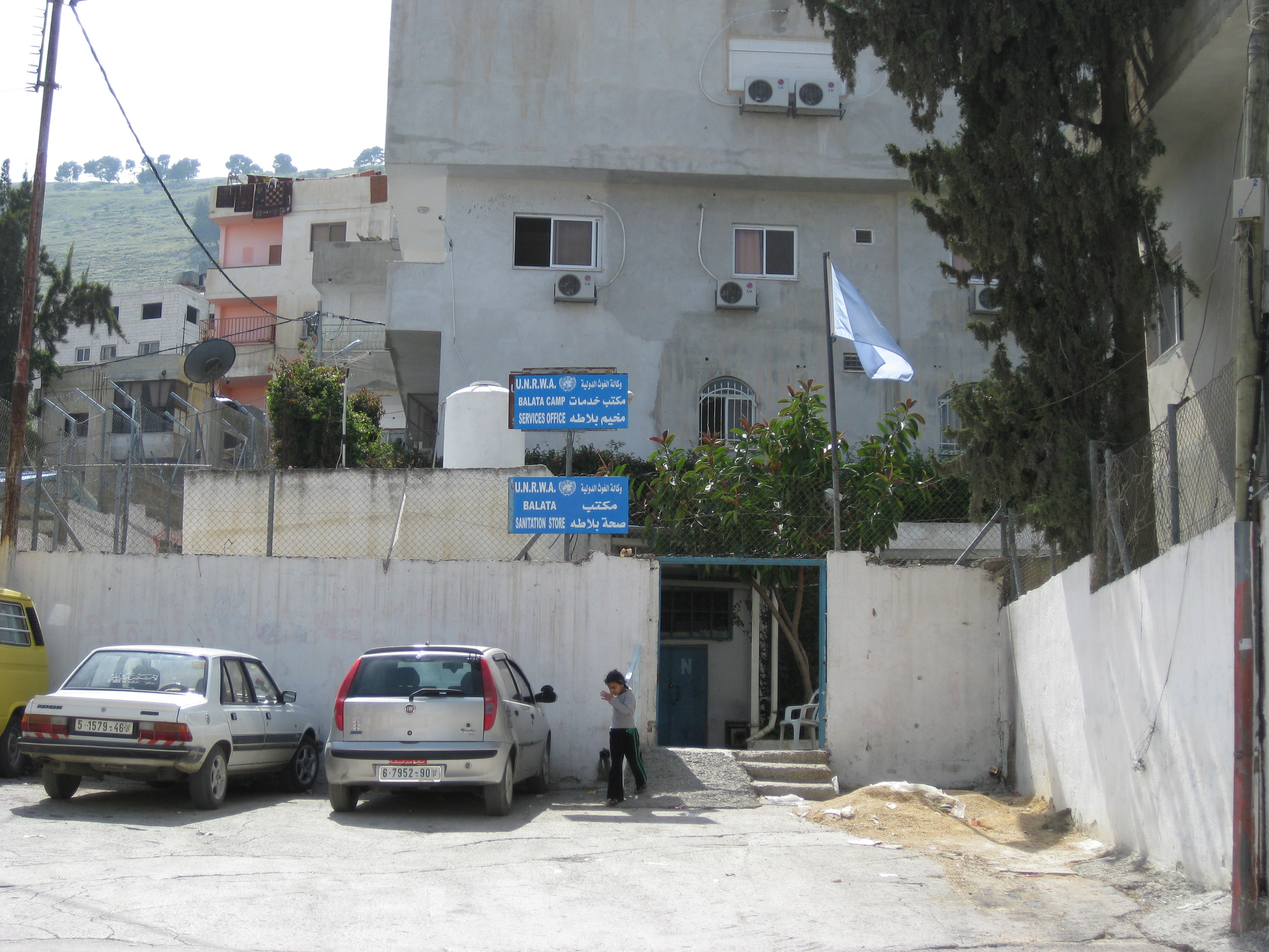 Balata camp